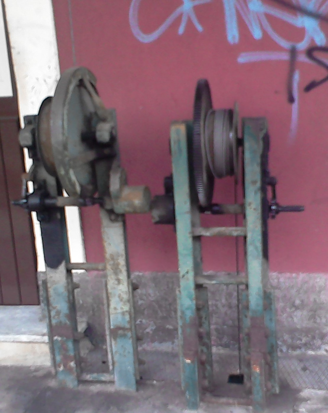 Leve (senza maniglia) per il commando manuale del passaggio a livello.